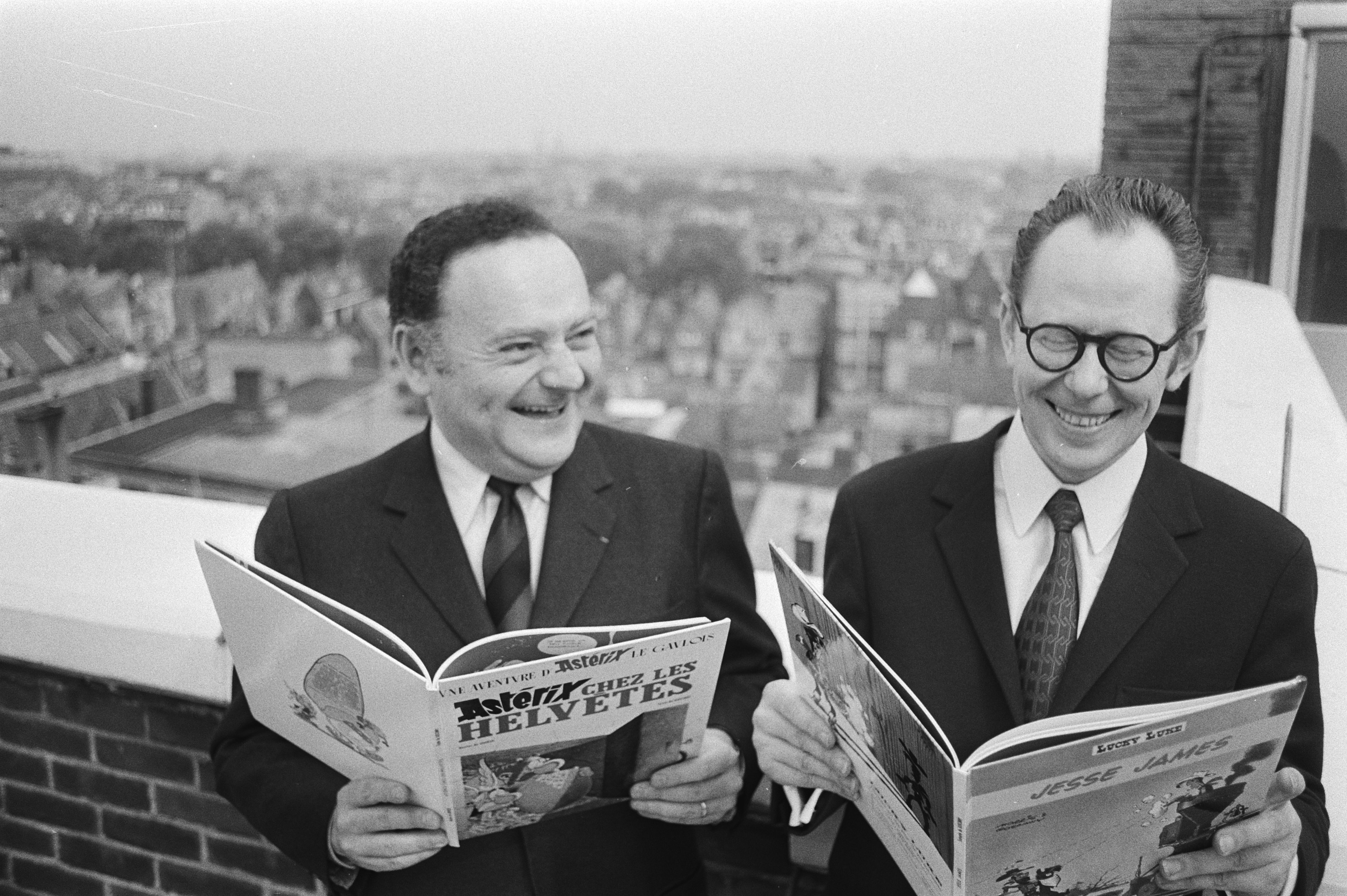 Collectie / Archief : Fotocollectie Anefo Reportage / Serie : Schrijvers van stripverhalen op dakterras Bijenkorf, Amsterdam Beschrijving : Goscinny (scenarist van de strips Asterix en Lucky Luke) (l) en Morris (tekenaar van de strip Lucky Luke (rechts) Annotatie : Gefografeerd op het dak van warenhuis De Bijenkorf Datum : 27 mei 1971 Locatie : Amsterdam, Noord-Holland Trefwoorden : schrijvers, strips, tekenaars Persoonsnaam : Goscinny, René, Morris (striptekenaar) Fotograaf : Fotograaf Onbekend / Anefo Auteursrechthebbende : Nationaal Archief Materiaalsoort : Negatief (zwart/wit) Nummer archiefinventaris : bekijk toegang 2.24.01.05 Bestanddeelnummer : 924-5894